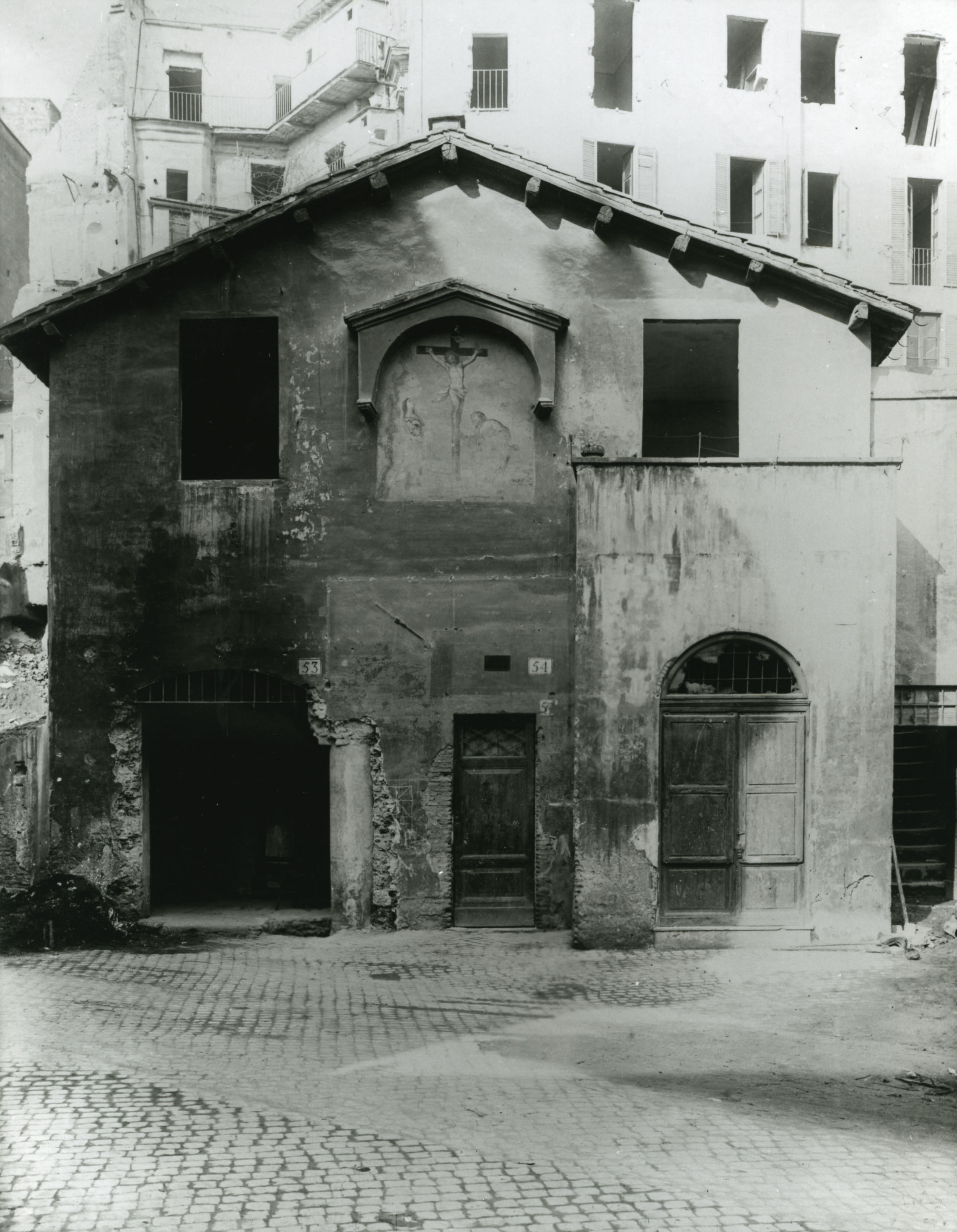 Chiesa distrutta di San Lorenzo in Nicolanaso